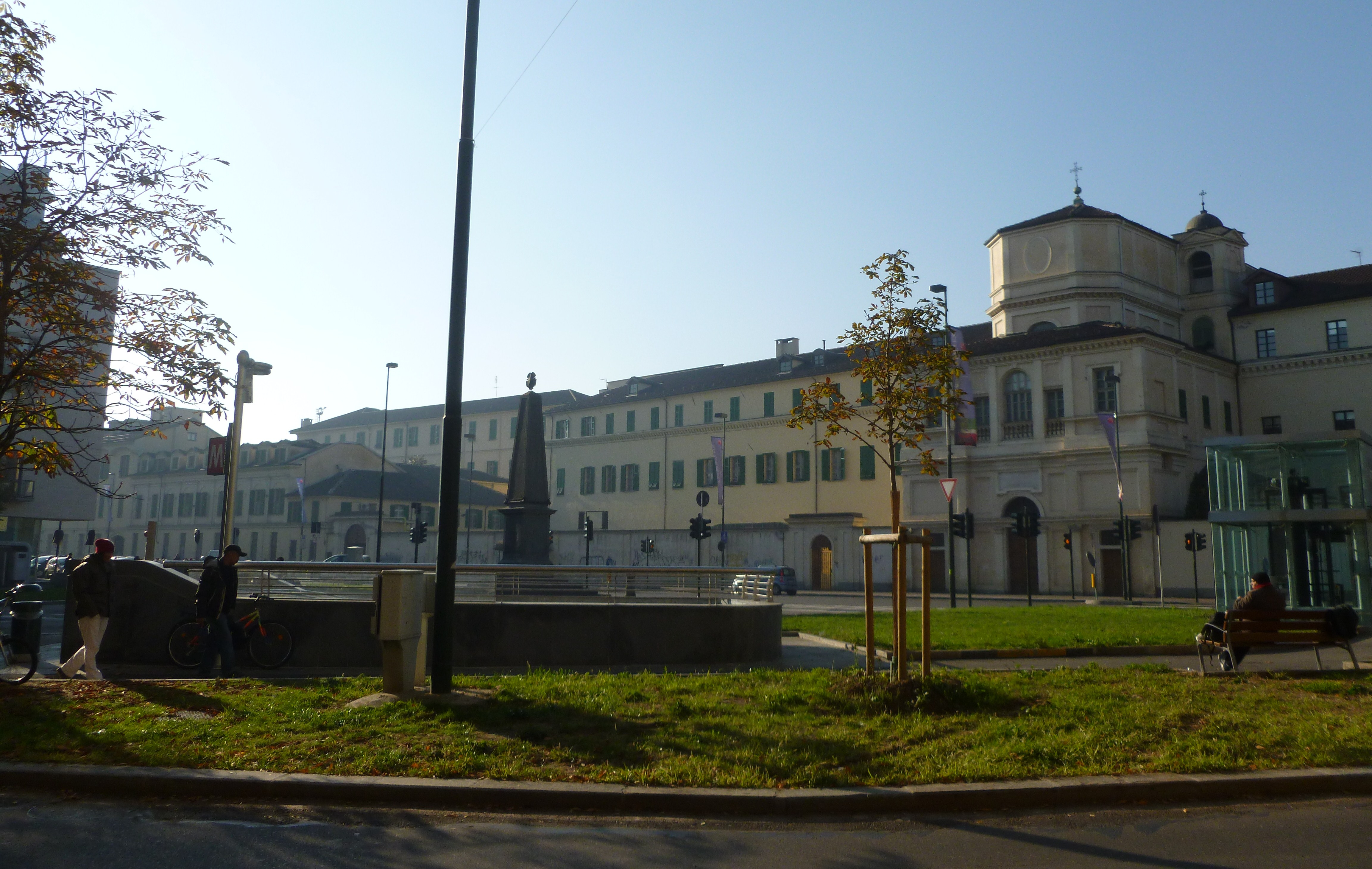 Stazione "Marconi" della metropolitana di Torino.